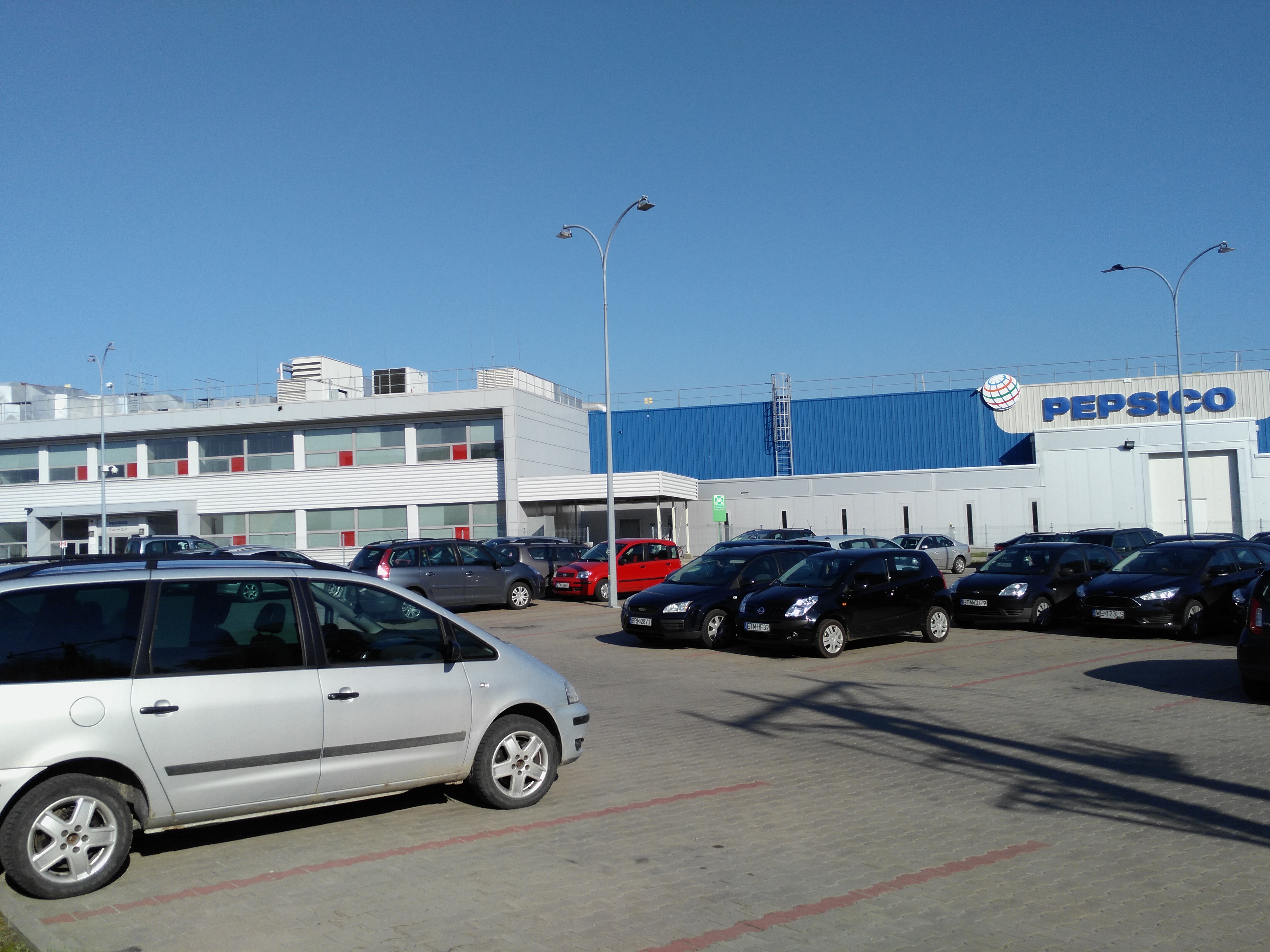 Fabryka PepsiCo w Tomaszowie Mazowieckim